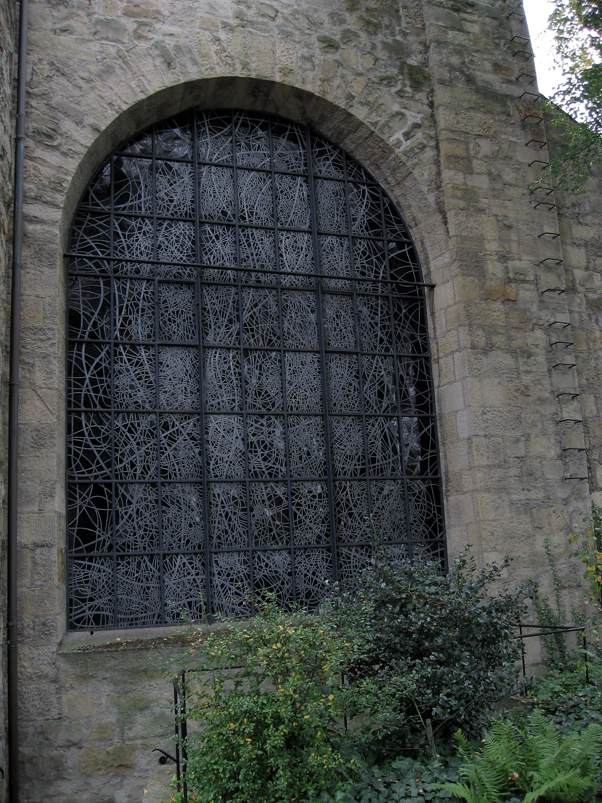 Dortmund, Bonifatius-Kirche, Fenster "Der brennende Dornbusch" von Hans Kaiser aus dem Jahre 1967 im nördlichen Seitenschiff